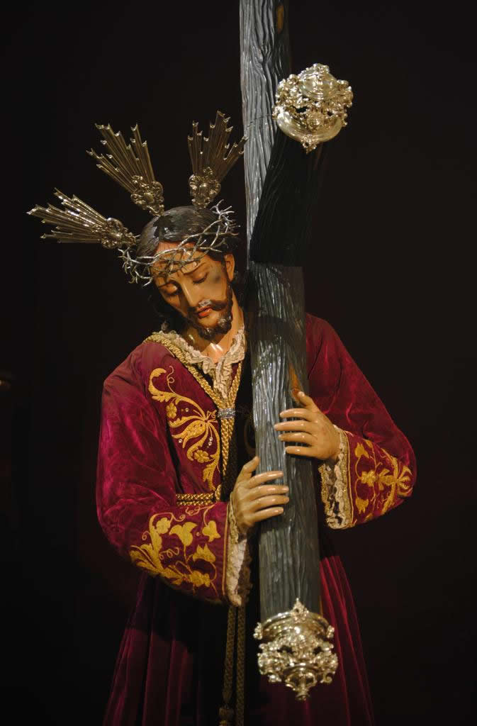 Señor del Calvario